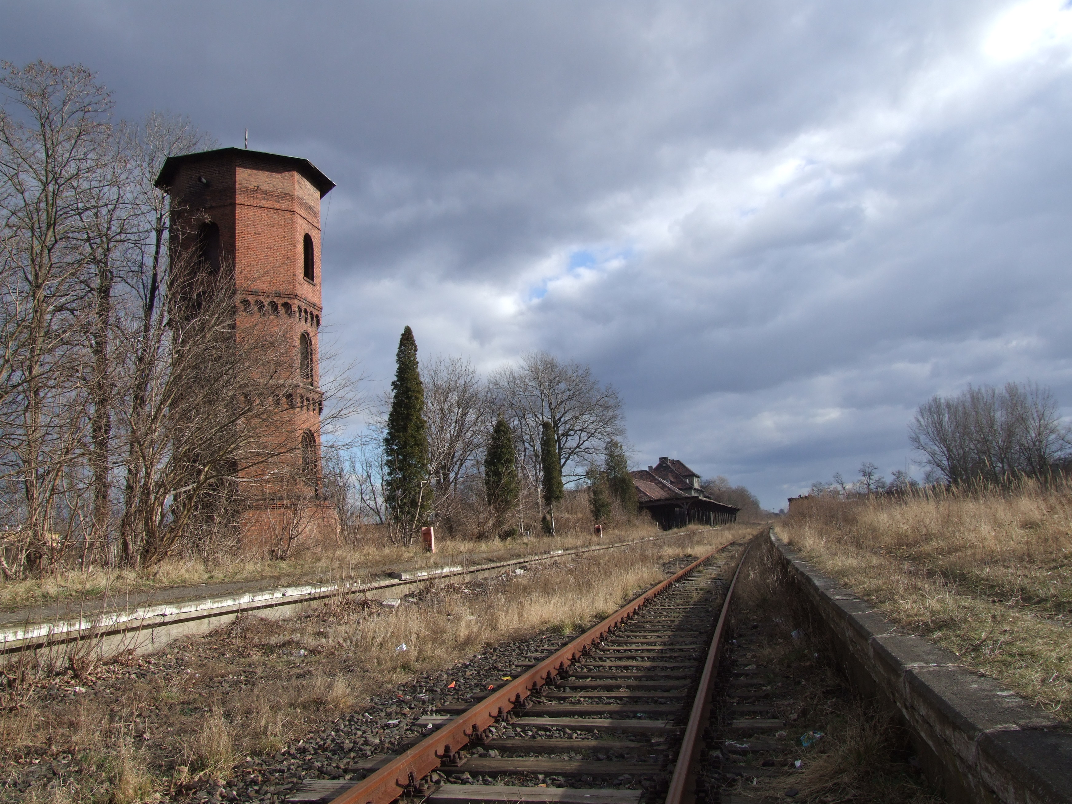 Widok na dworzec w Lubsku